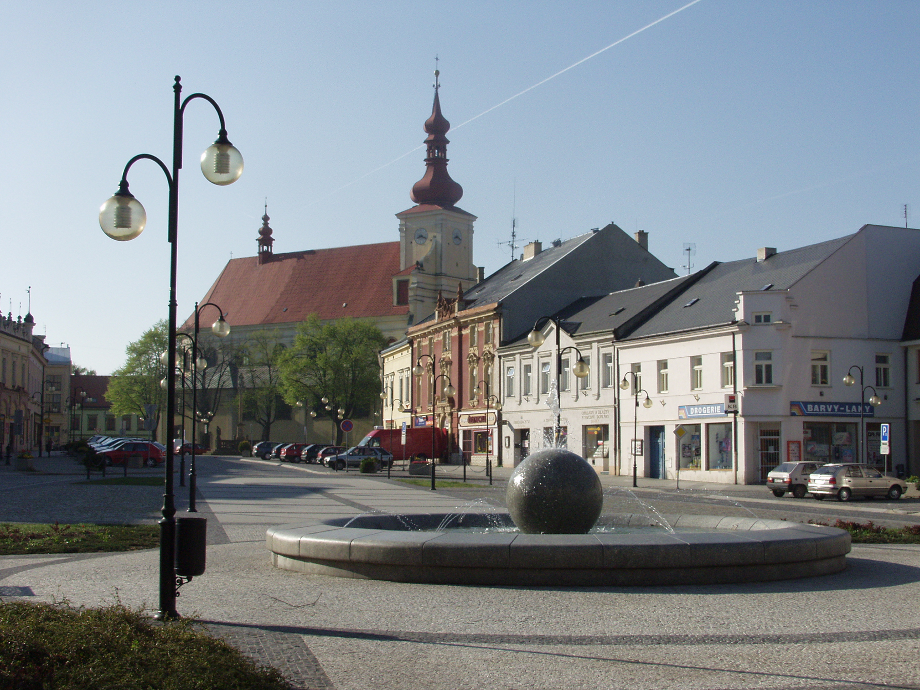 Dr. Edvard Beneš Square in Holešov (Czech Republic). Náměstí Dr. Edvarda Beneše v Holešově.